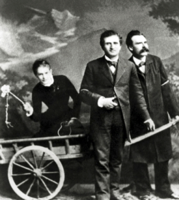 Friedrich Wilhelm Nietzsche lui-même et Lou andreas salomé